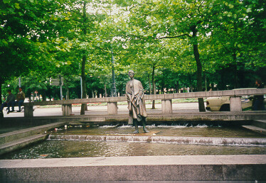 Manzubrunnen Augsburg vor dem Königsplatzumbau